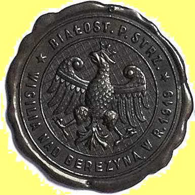 Odznaka Białostockiego Pułku Strzelców (późniejszego 79 pp. II RP); wykonanie z mosiądzu